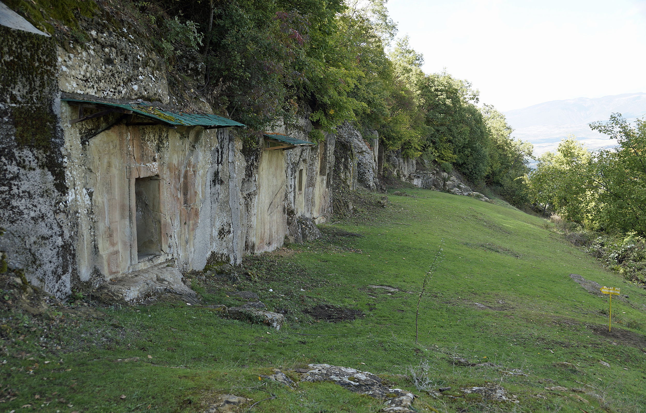 Selca e Poshtmë, Albania: the terrace of tomb 4